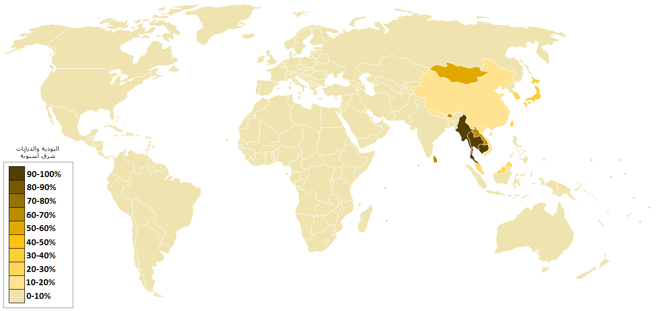 خارطة تظهر انتشار البوذيين في العالم - تُعاني من صعوبة مع الألوان؟؟ إضغط هنا[1].